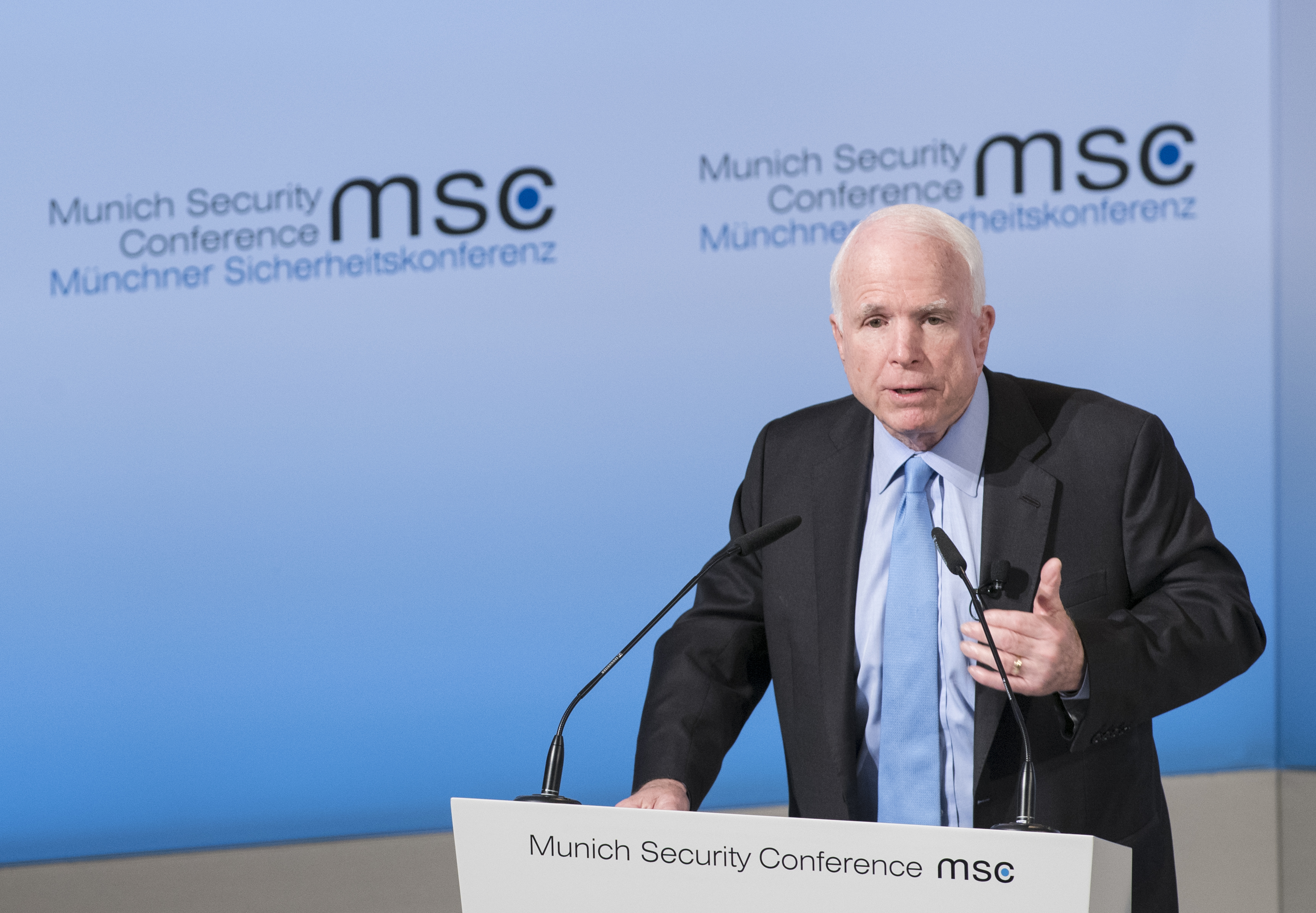 John McCain während der Münchner Sicherheitskonferenz 2017